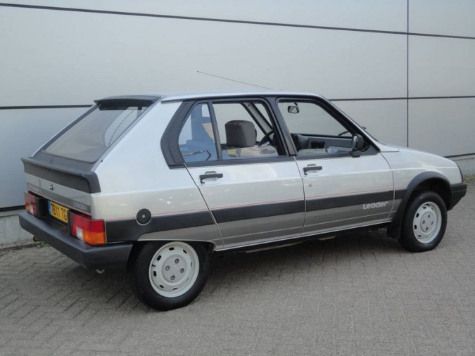 1986 Citroën Visa Leader D (1769cc, 60 PS)